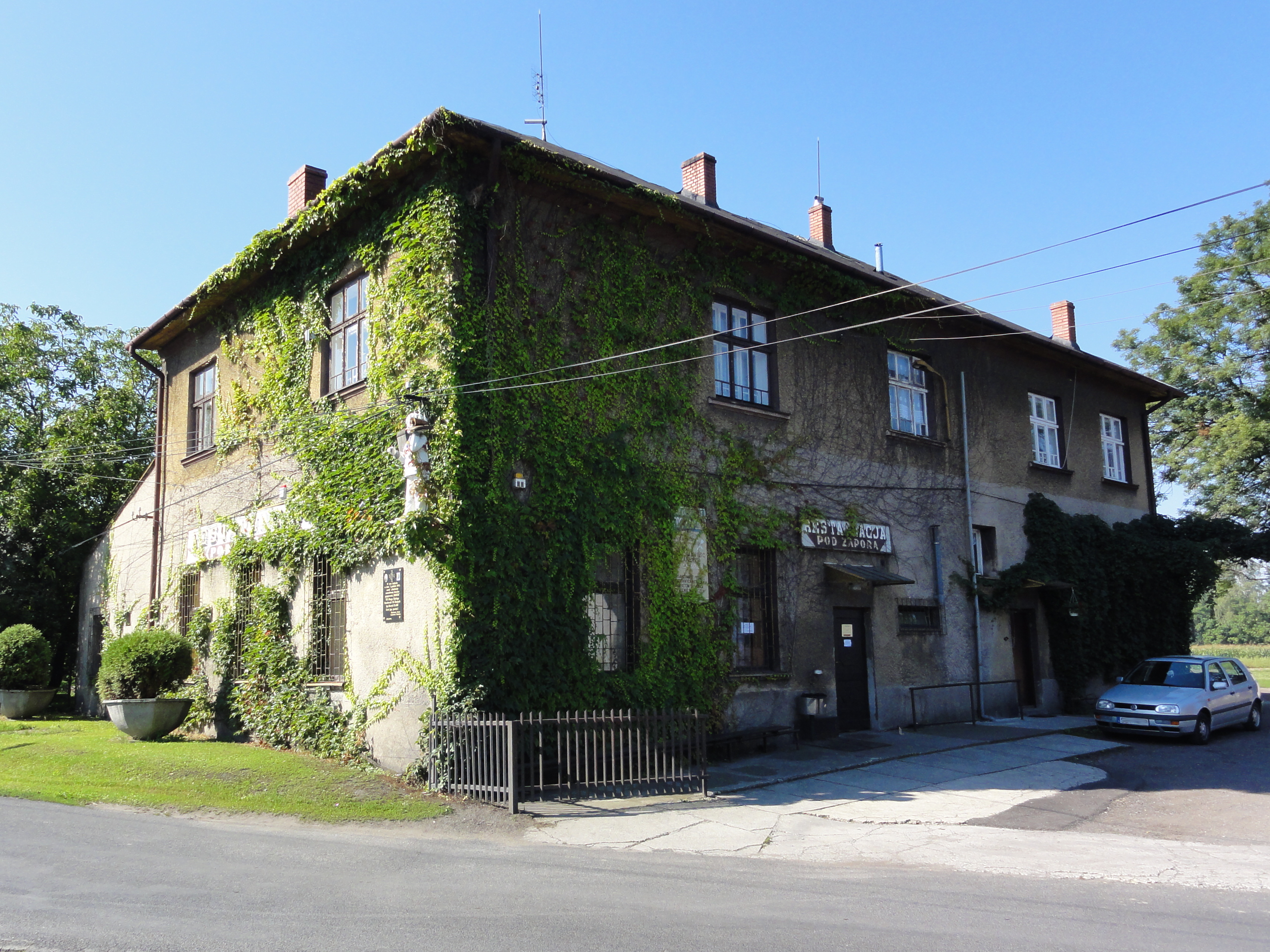 Restauracja pod Zaporą w Zabrzegu